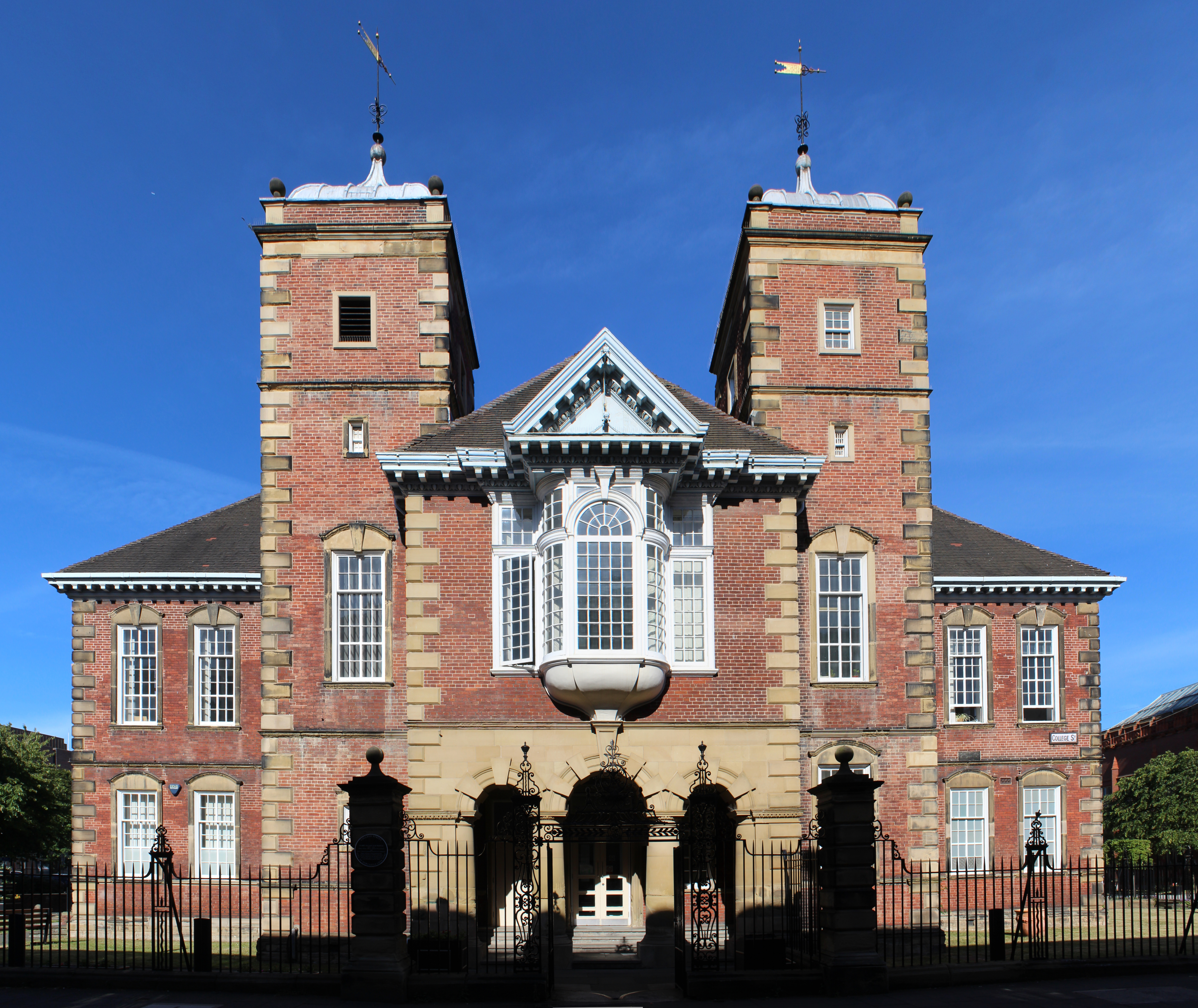 École de Dame Allan, Newcastle upon Tyne.